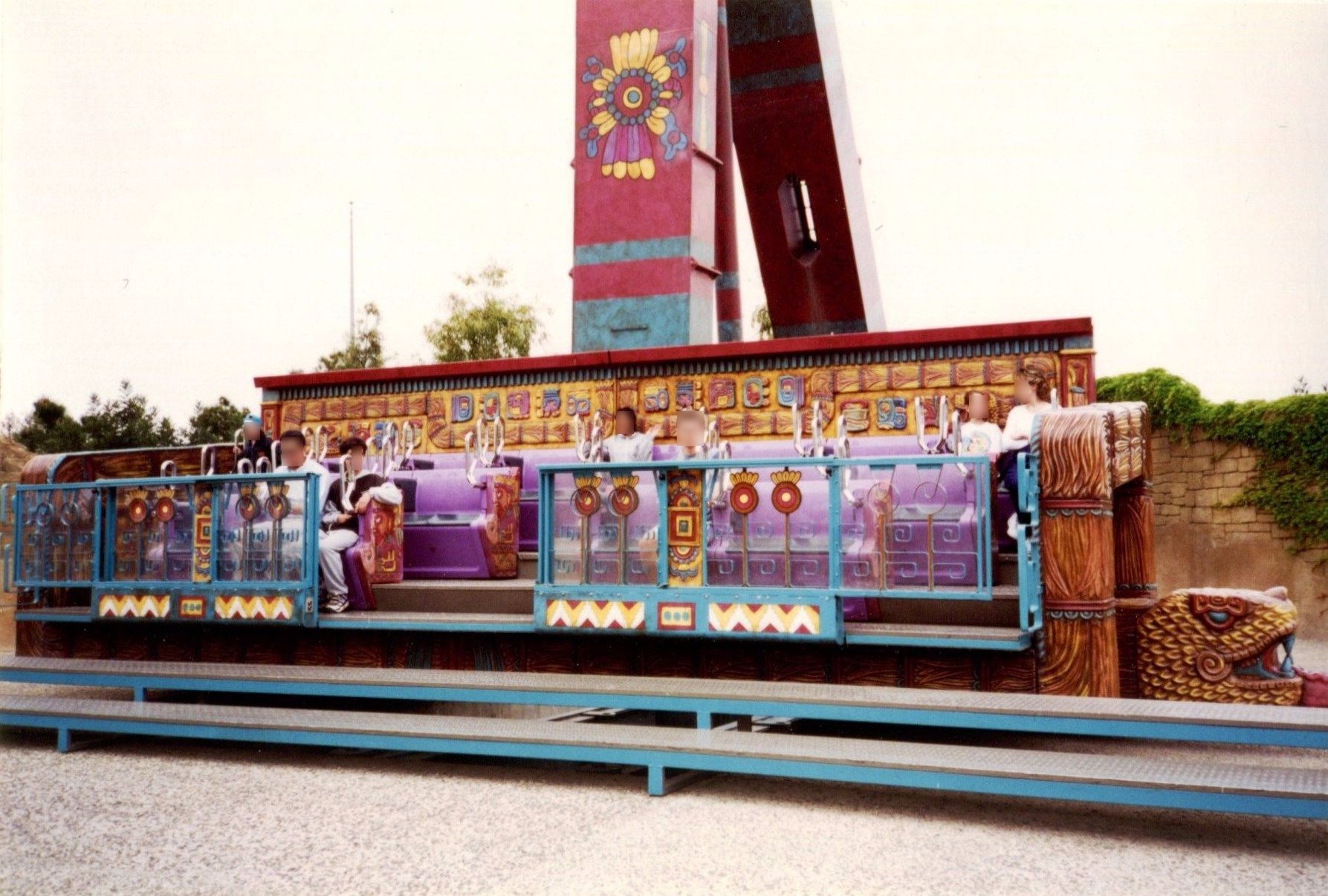 PortaventuraTronodePacal